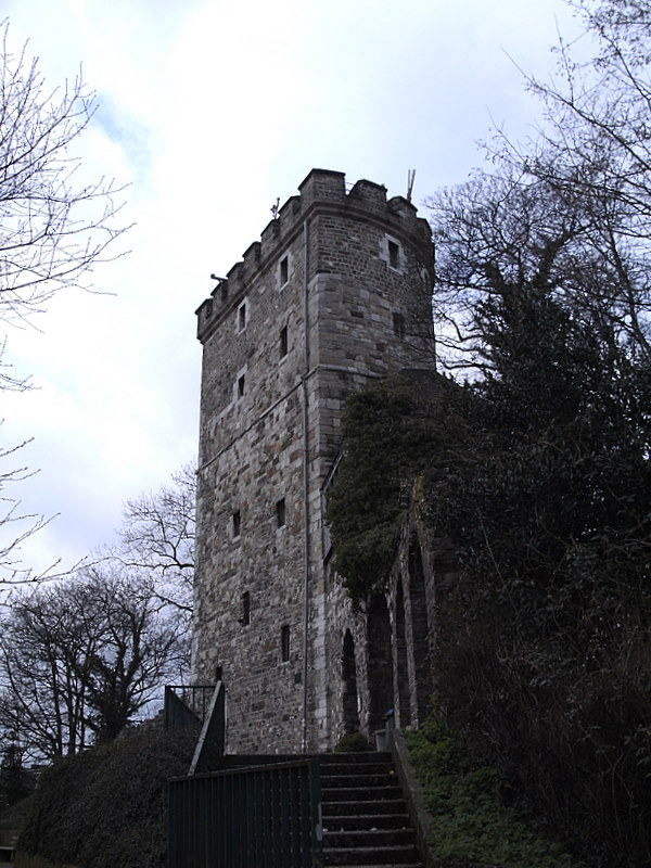 Lnger Turm in Aachen